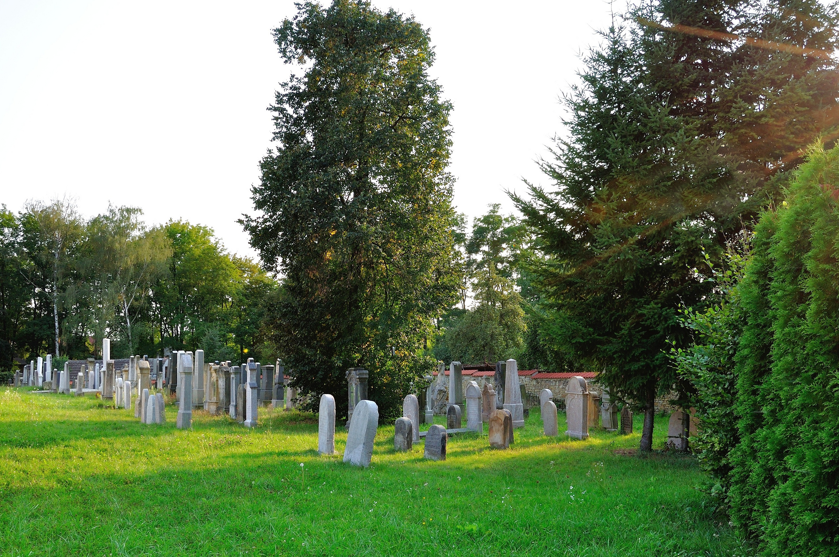 103192 Židovský hřbitov Kostelec nad Labem